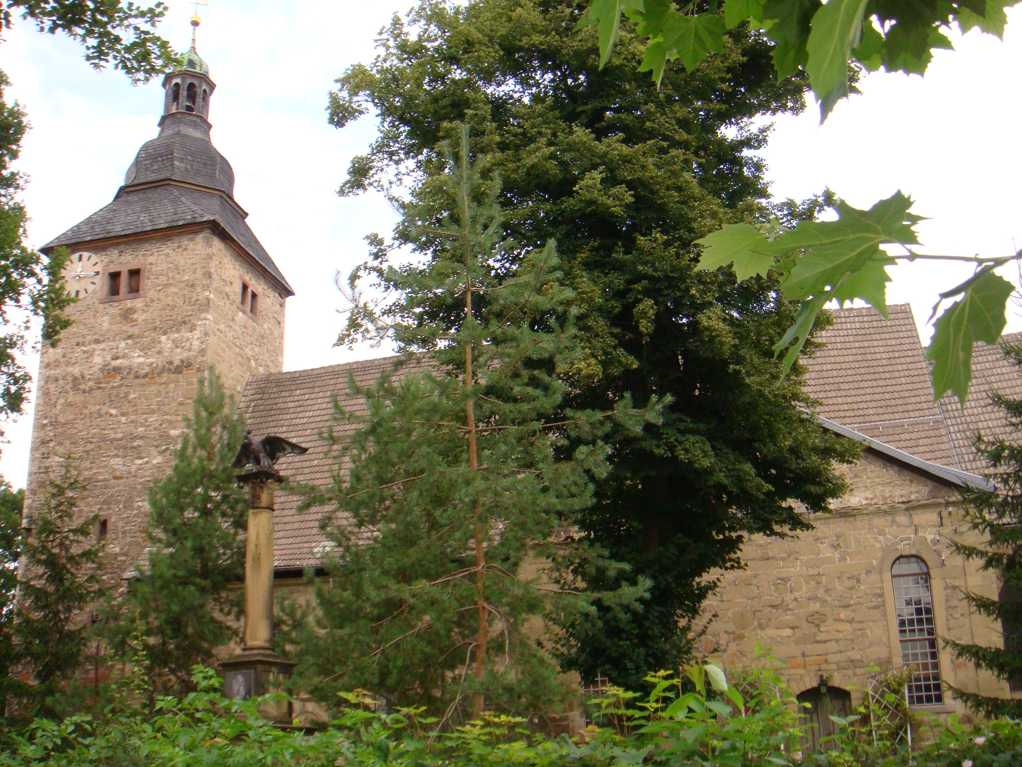 Evangelische Kirche Straußfurt